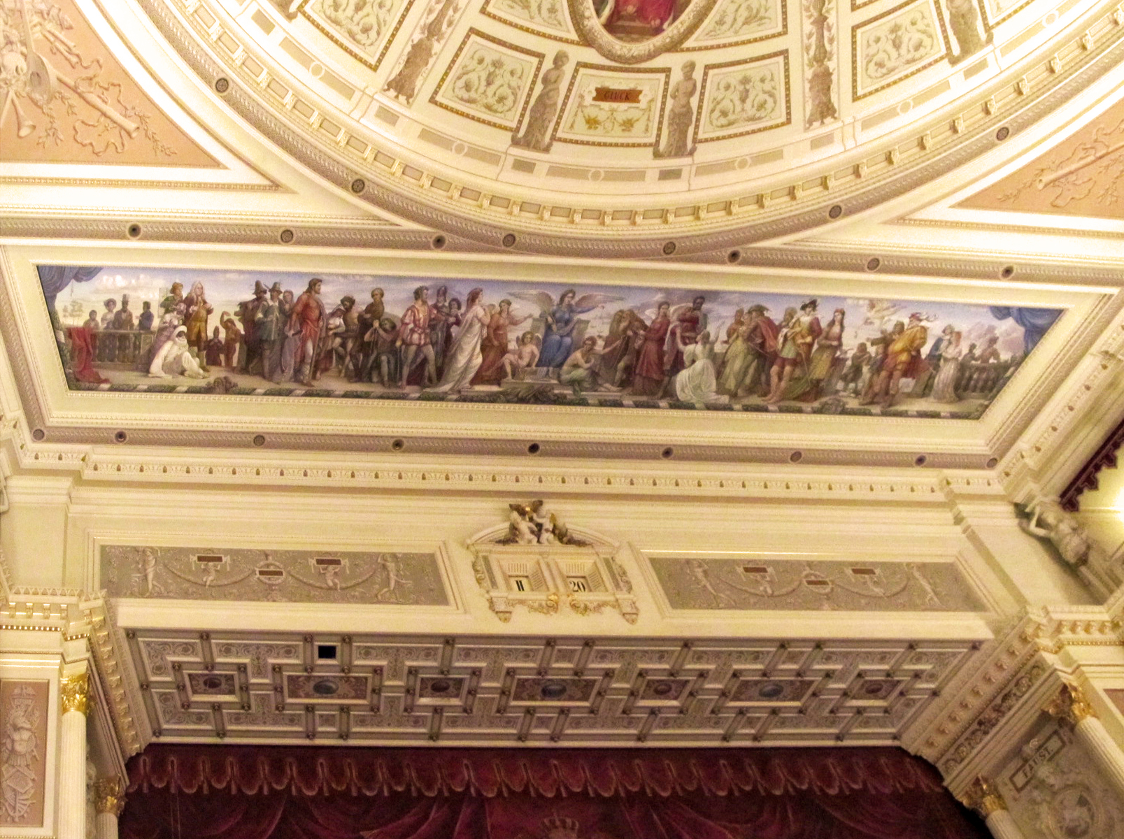 Фриз авансцены оперы Земпера